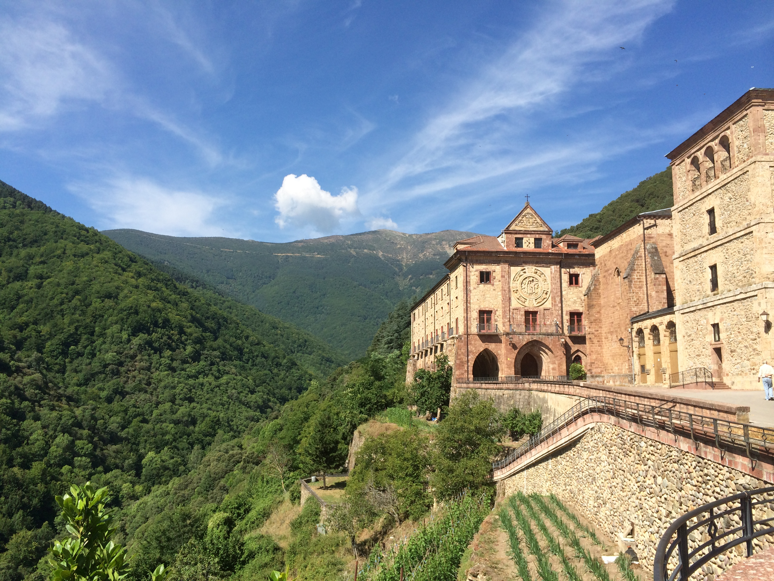 El Monasterio de Valvanera está compuesto de una comunidad de monjes benedictinos dedicada a custodiar el Santuario de Nuestra Señora de Valvanera, Patrona de La Rioja. Se rigen por la santa Regla de San Benito. Esta situado en plena Sierra de la Demanda, Anguiano. RI-51-0010734